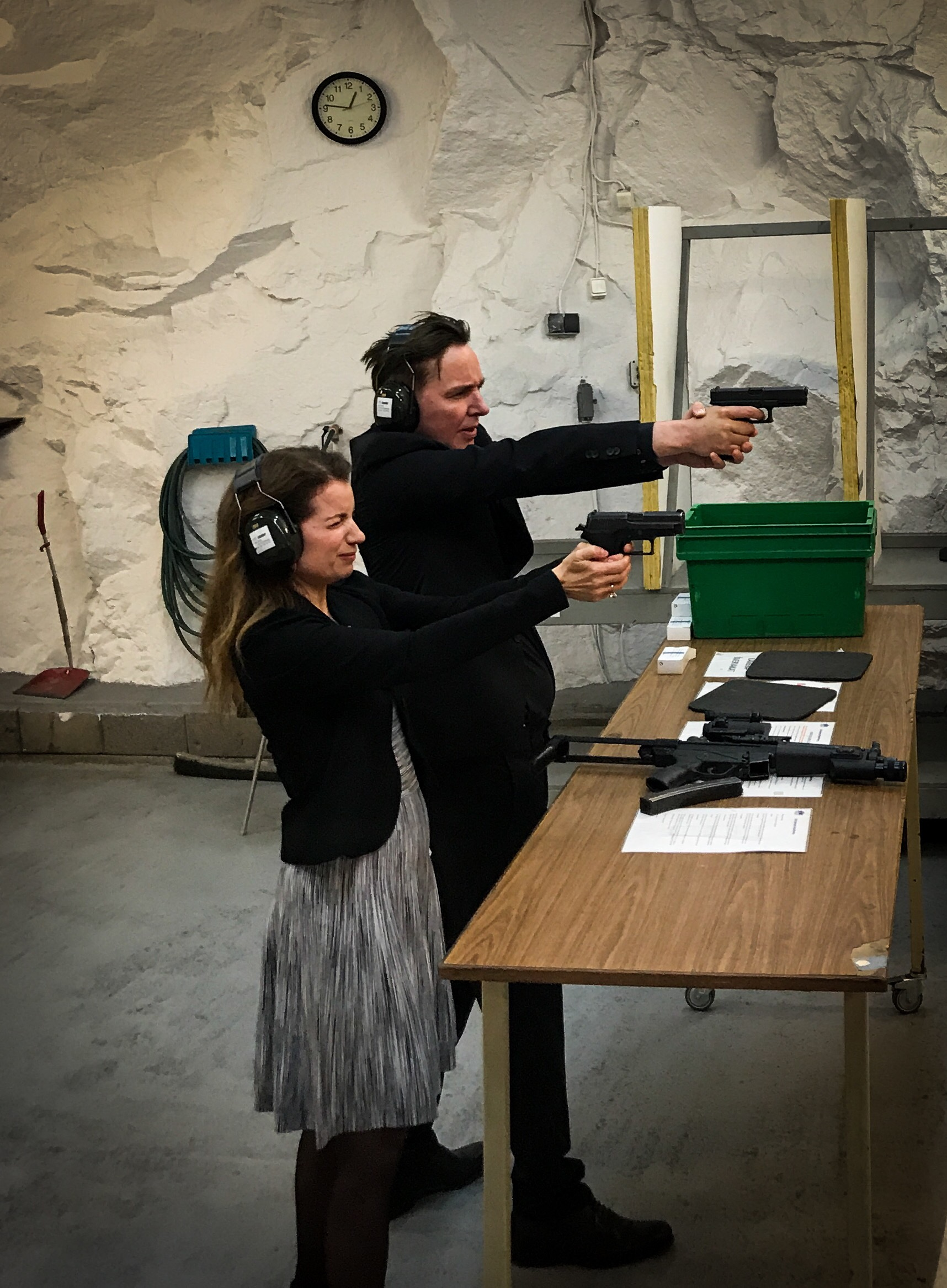 Alexander och Alexandra Ahndoril provar pistoler som research